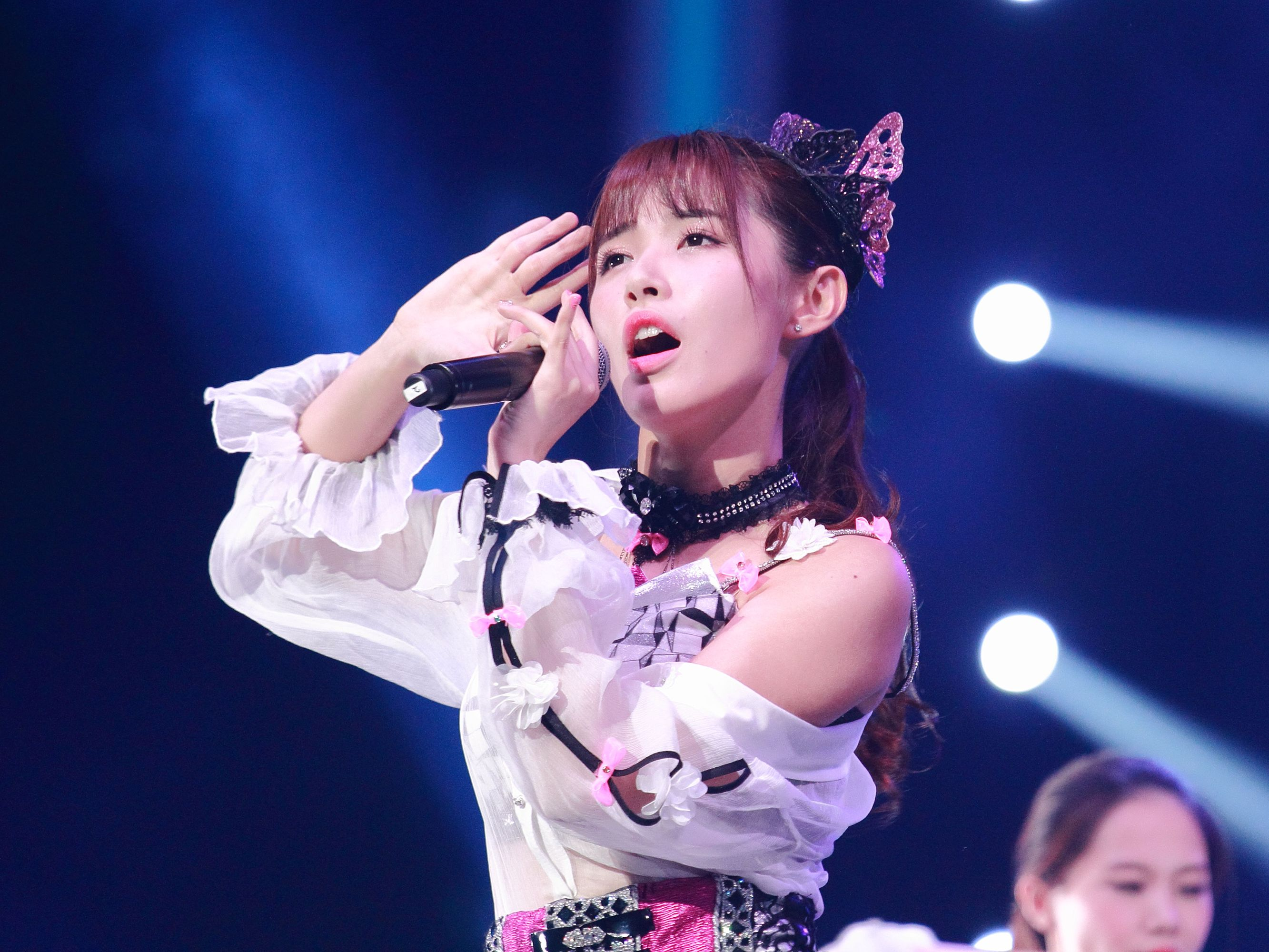 SNH48 第二届总选举